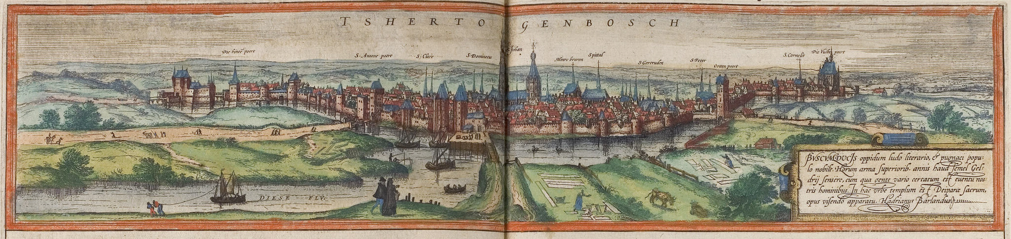 's-Hertogenbosch